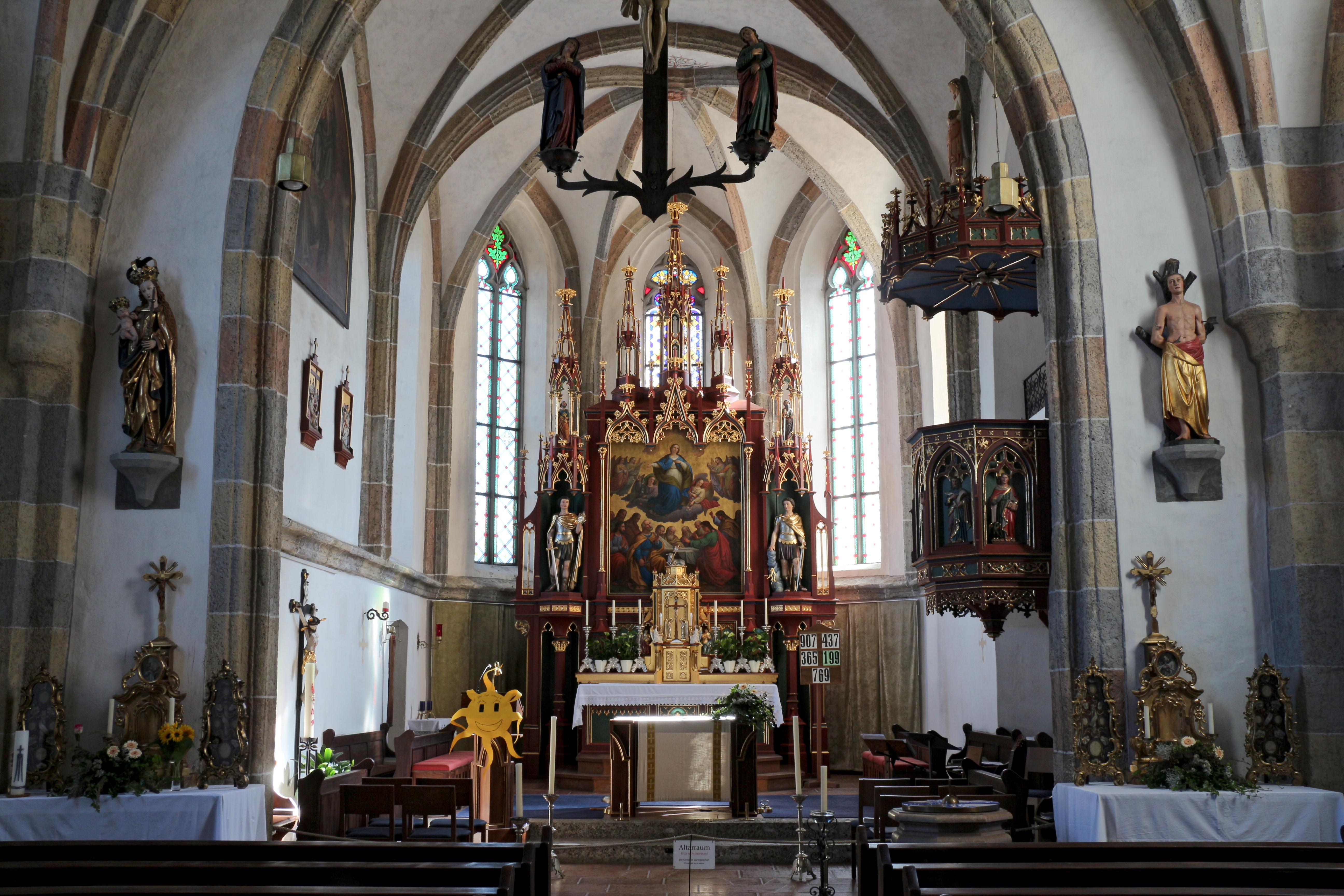 Kath. Pfarrkirche Mariae Himmelfahrt, Anthering (Bezirk Salzburg-Umgebung)